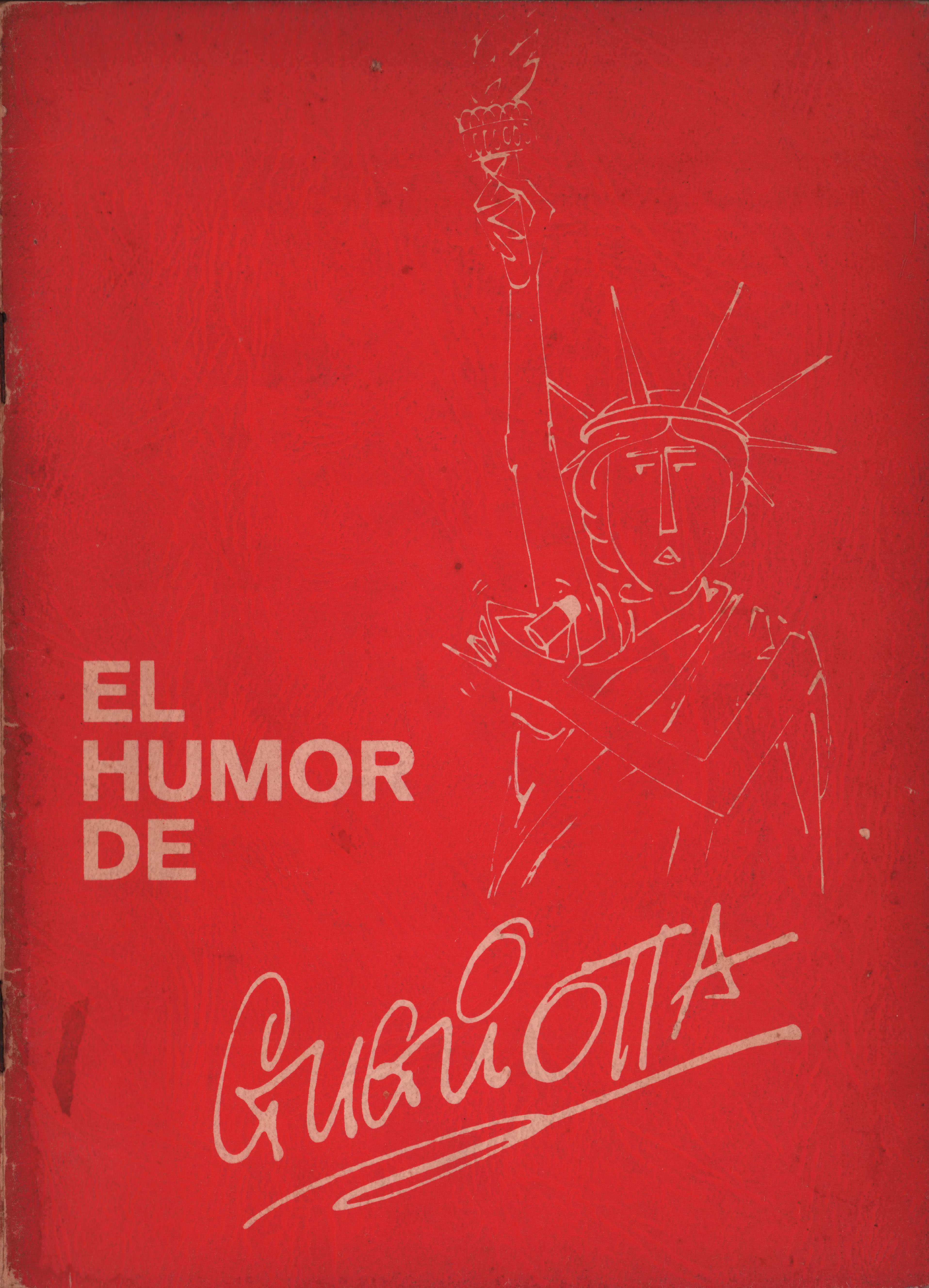 Tapa del folleto de la exposición de Daniel Gugliotta en 1965, llevada a cabo en el Centro Cultural Paraguayo Americano